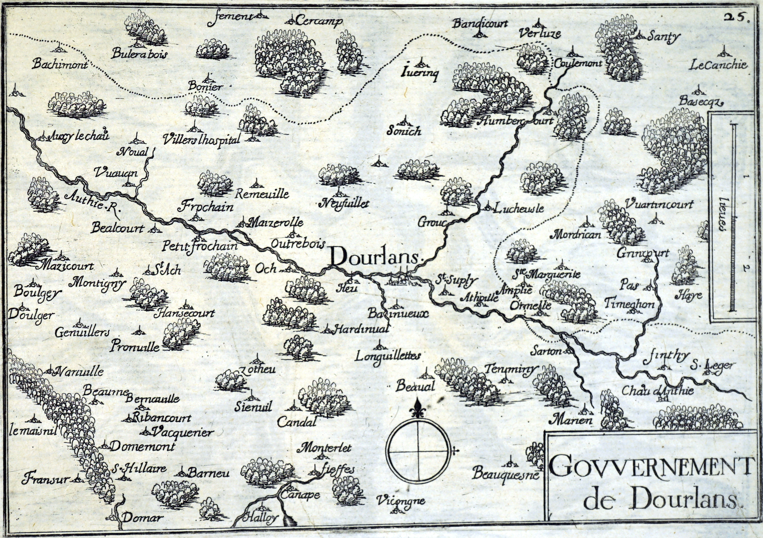 dessin de Tassin, 1634.